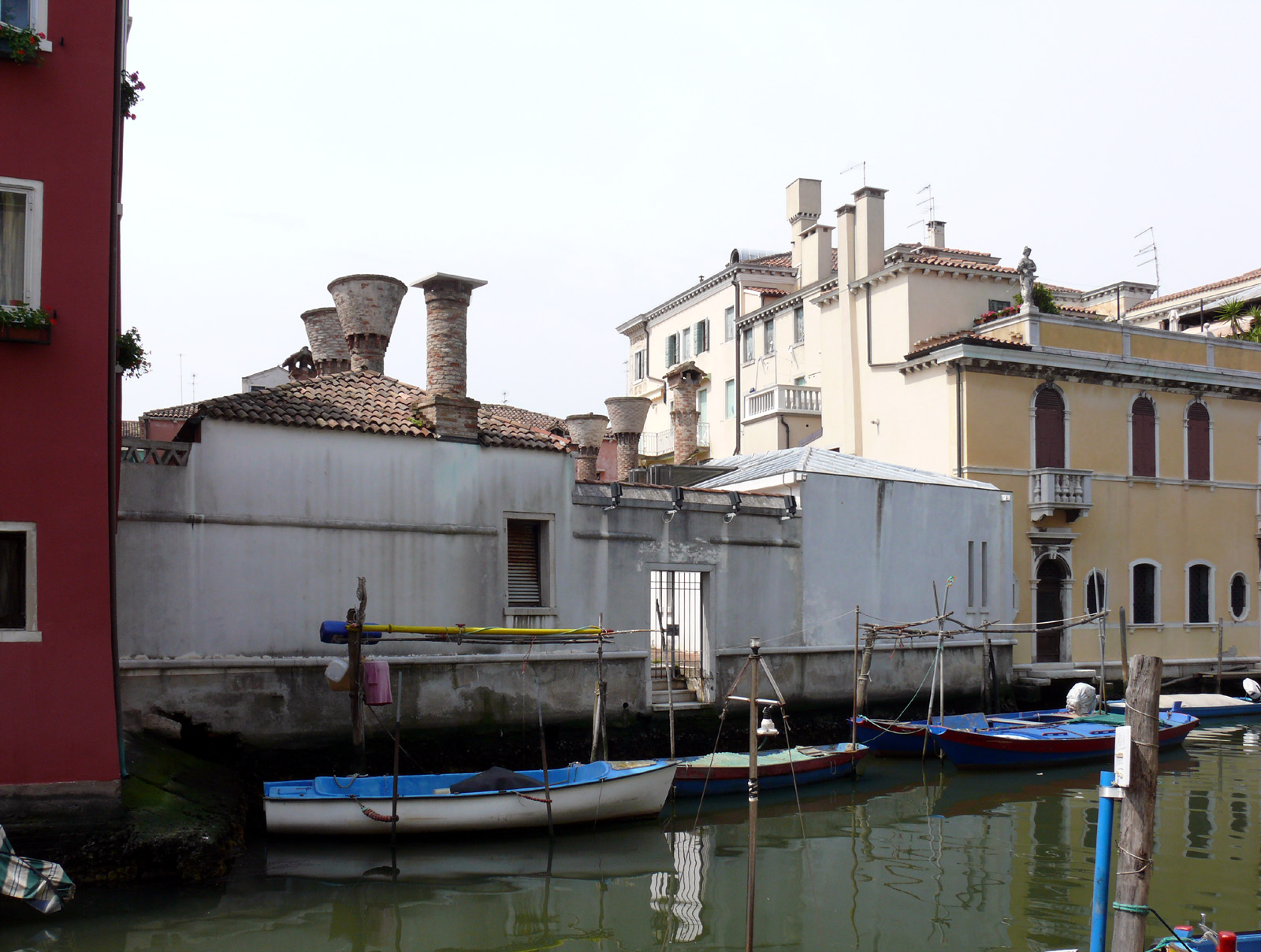 canal Vena - pittoreschi comignoli